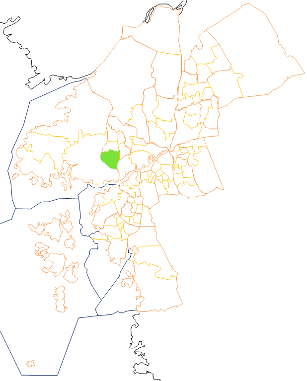 Karta som visar primärområdes belägenhet i Göteborg